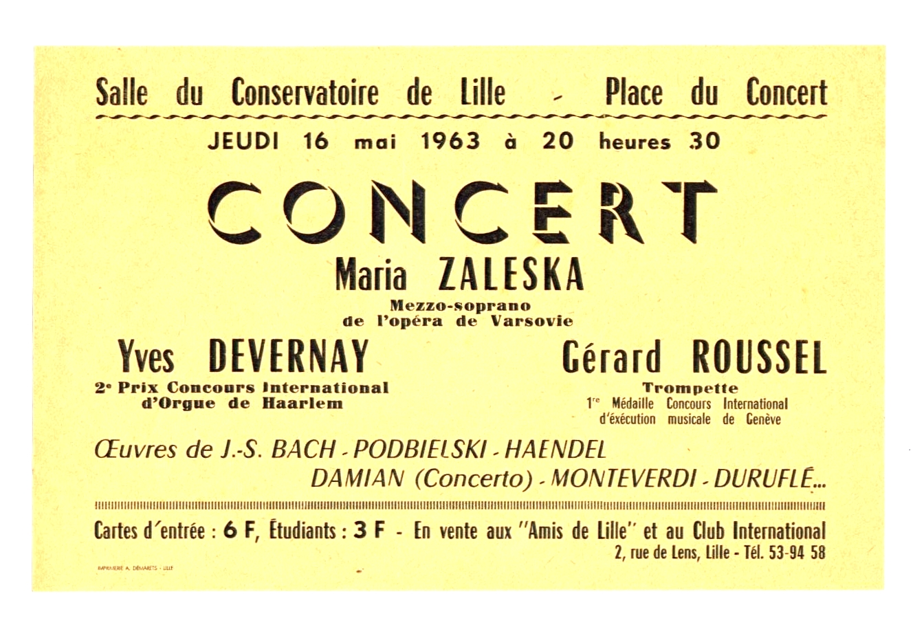 Prospectus d'un concert organisé par le Club International